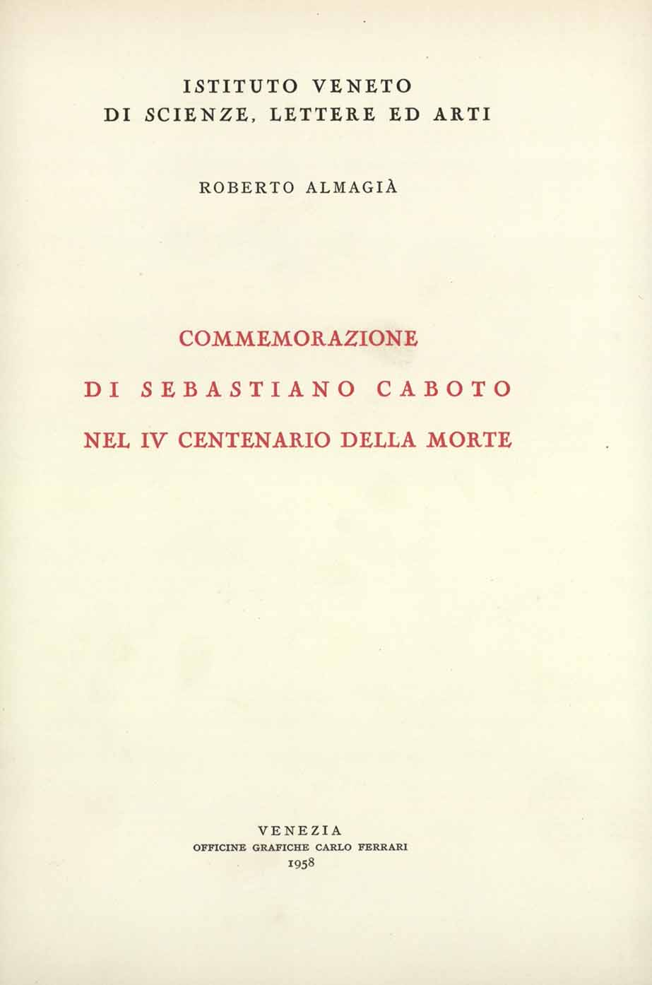 Commemorazione di Sebastiano Caboto nel 4. centenario della morte / Roberto Almagià. - Venezia : Officine grafiche Carlo Ferrari, 1958. - 70 p. : 1 tav. ; 24 cm .